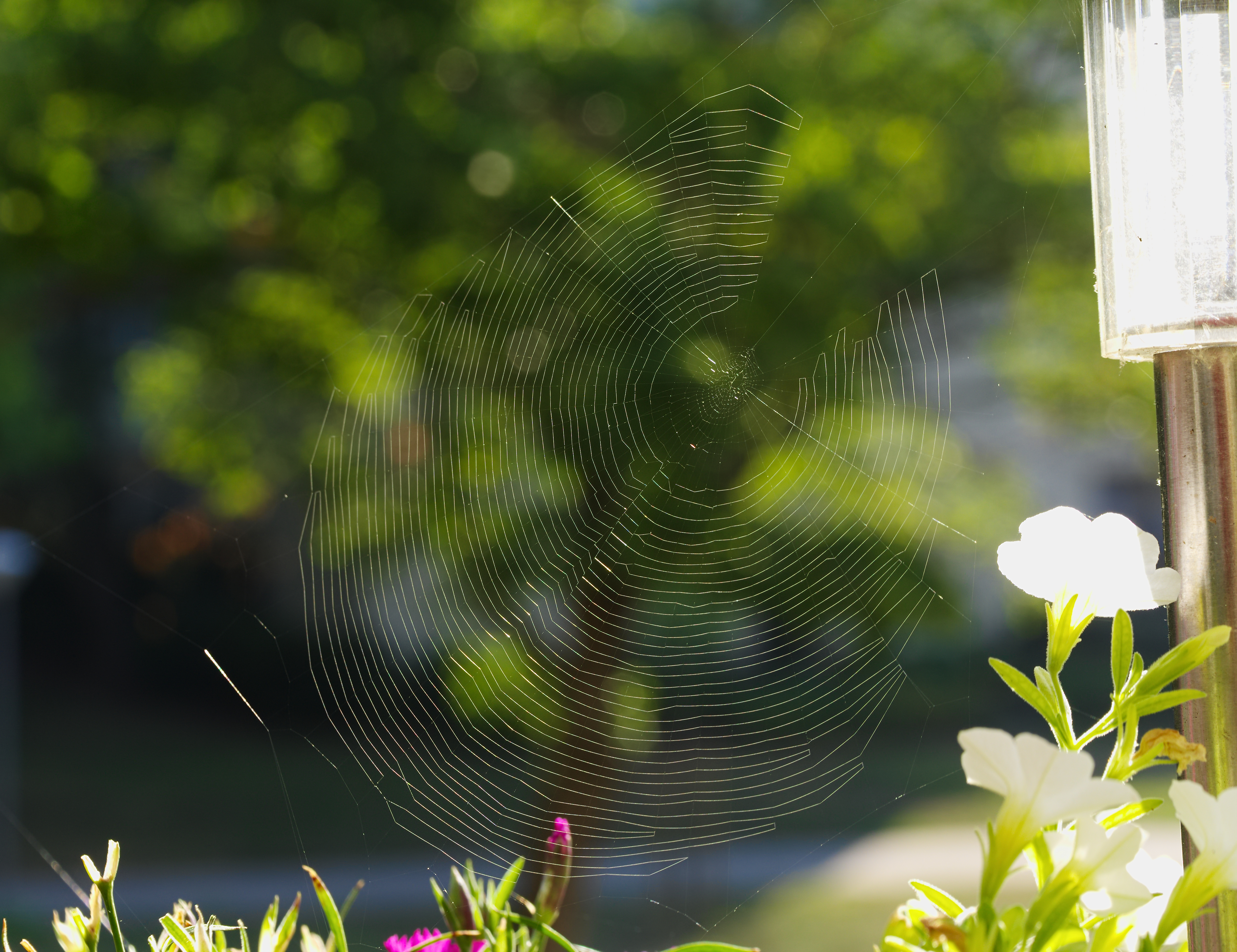 Sektorspinne - Zygiella x-notata, Radnetz. Aufgenommen in Mannheim-Vogelstang, Baden-Württemberg, Deutschland.